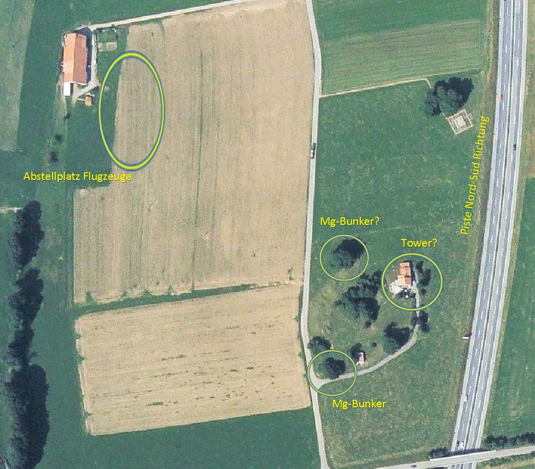 Flugplatz Riaz FR, Schweiz 1939-1944